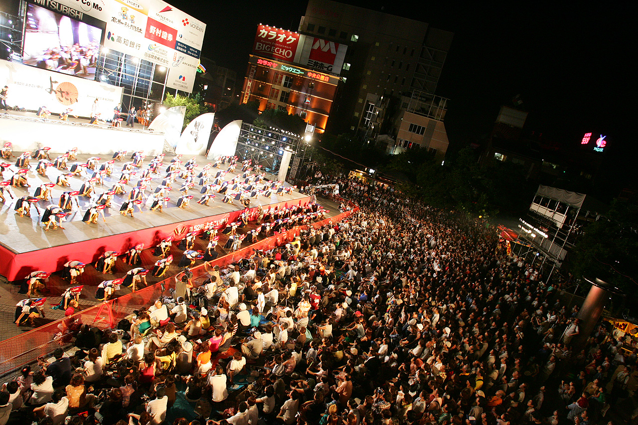 高知よさこい祭り2005